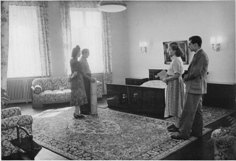 HO-Möbelhaus, Schlafzimmer Im ehem. Feder-Haus am Rosenthaler Platz wurde am 6.9.49 ein Möbelhaus der HO eröffnet. Neben Möbeln sind auch Teppiche, Tapeten und Möbelstoffe dort erhältlich. UBz: Ein Schlafzimmer. Aufn.: Illus Igel (4) 6.4.49